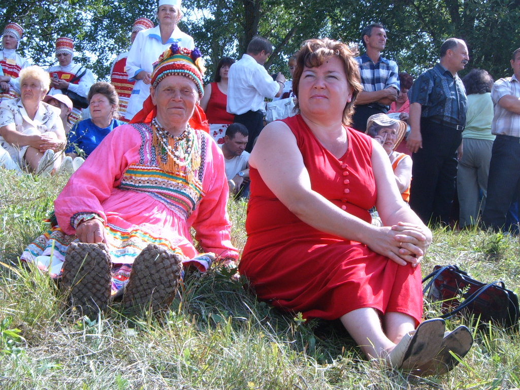 Эрзянь: Сёка баба оймси нар лакгсо эрзянь оршамопельсэ Раськень Озксо, 2007 иестэ